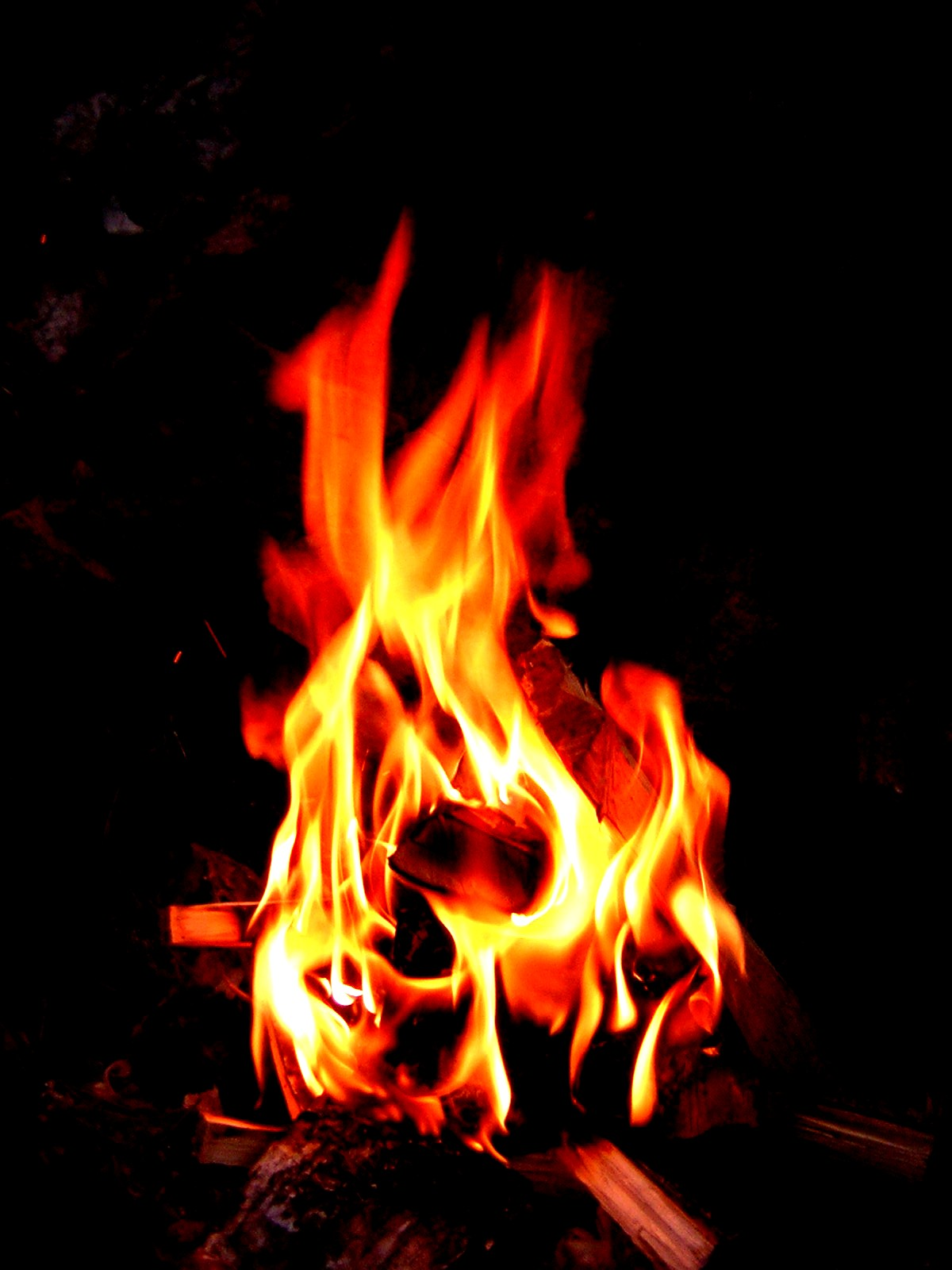 Et bål